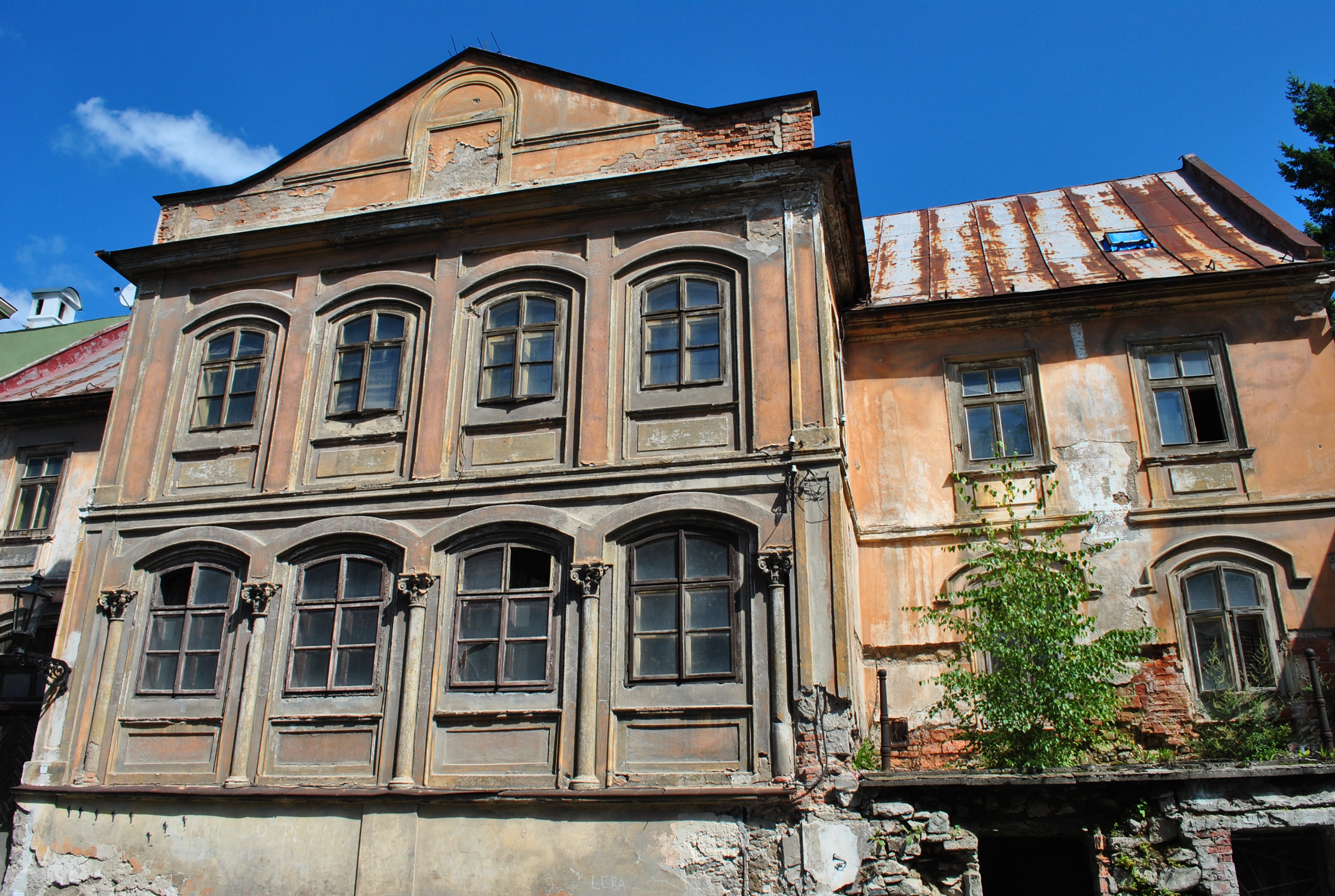 Dom meštiansky